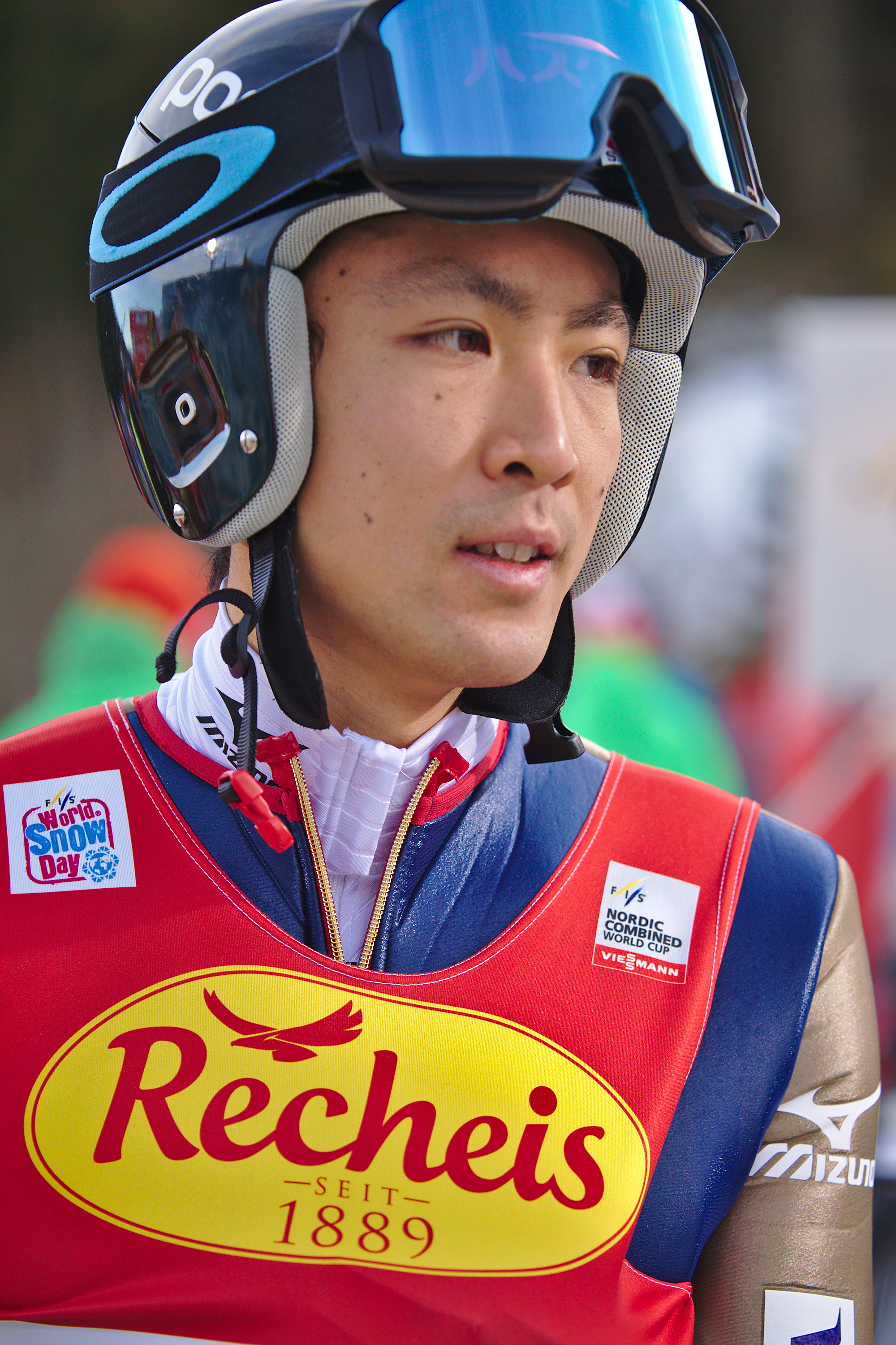 FIS Worldcup Nordic Combined Ramsau 2016. Bild zeigt Akito Watabe (JPN)